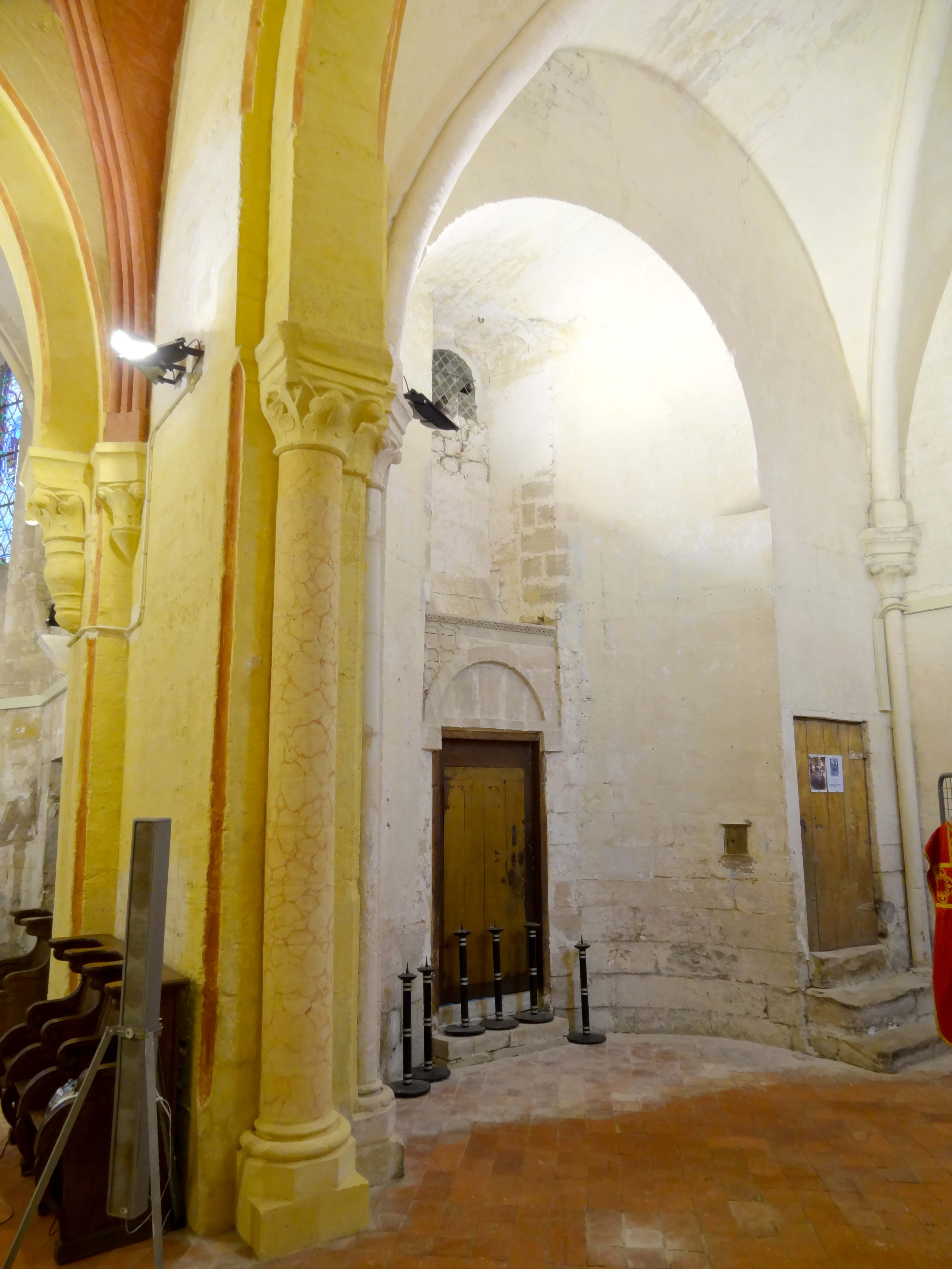 Intérieur de l'église - voir titre.